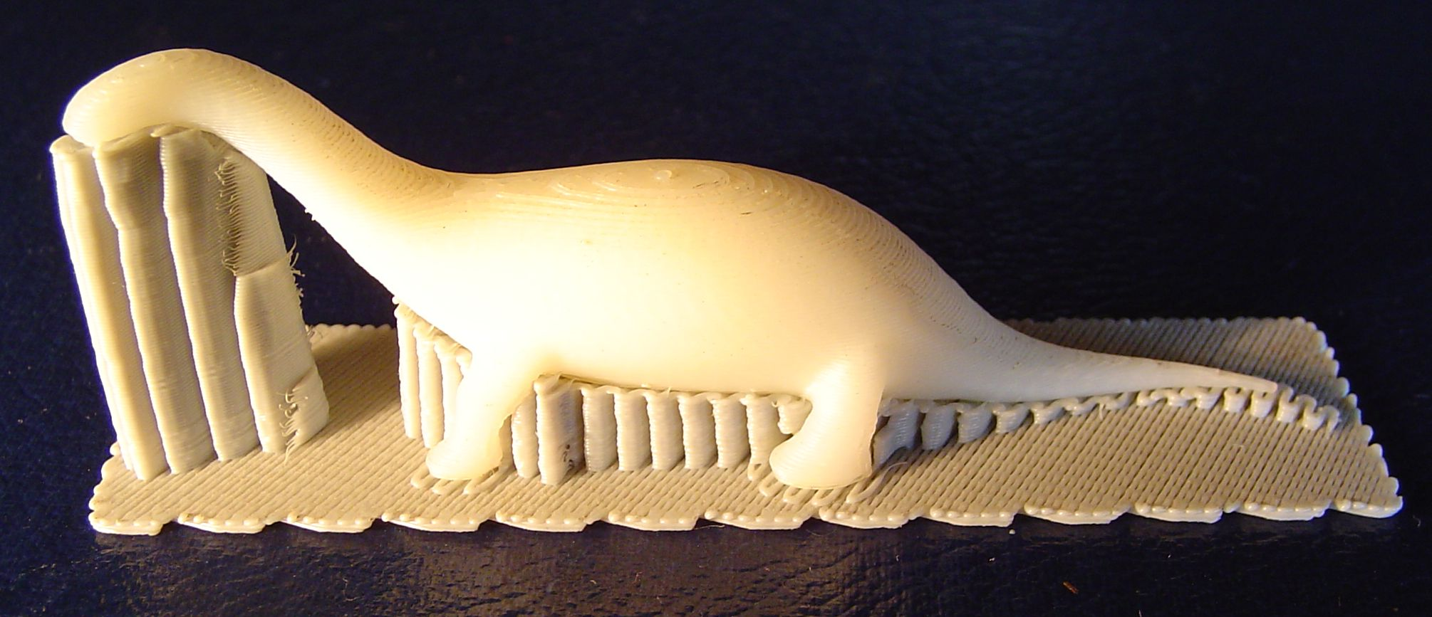 Kunststoffdino mit Stützstruktur Rapid Prototyping /Kunststoff schichtweise aufgetragen